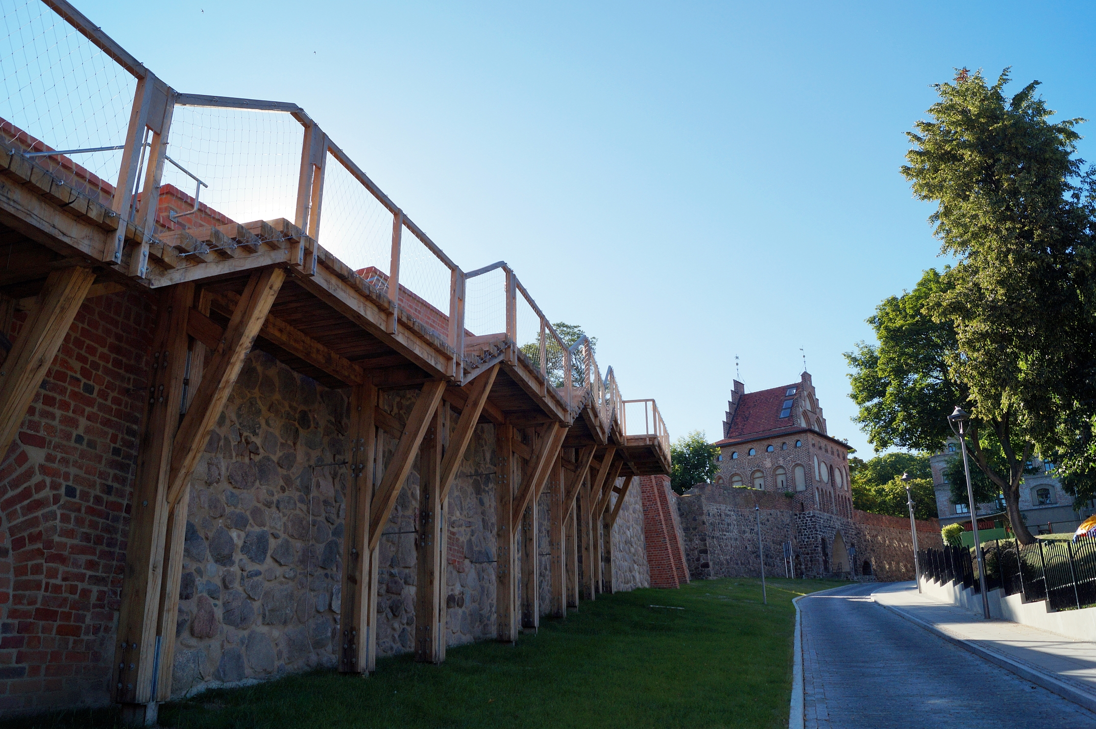 Stargard Szczeciński, mury obronne, XIII/XIV, XV